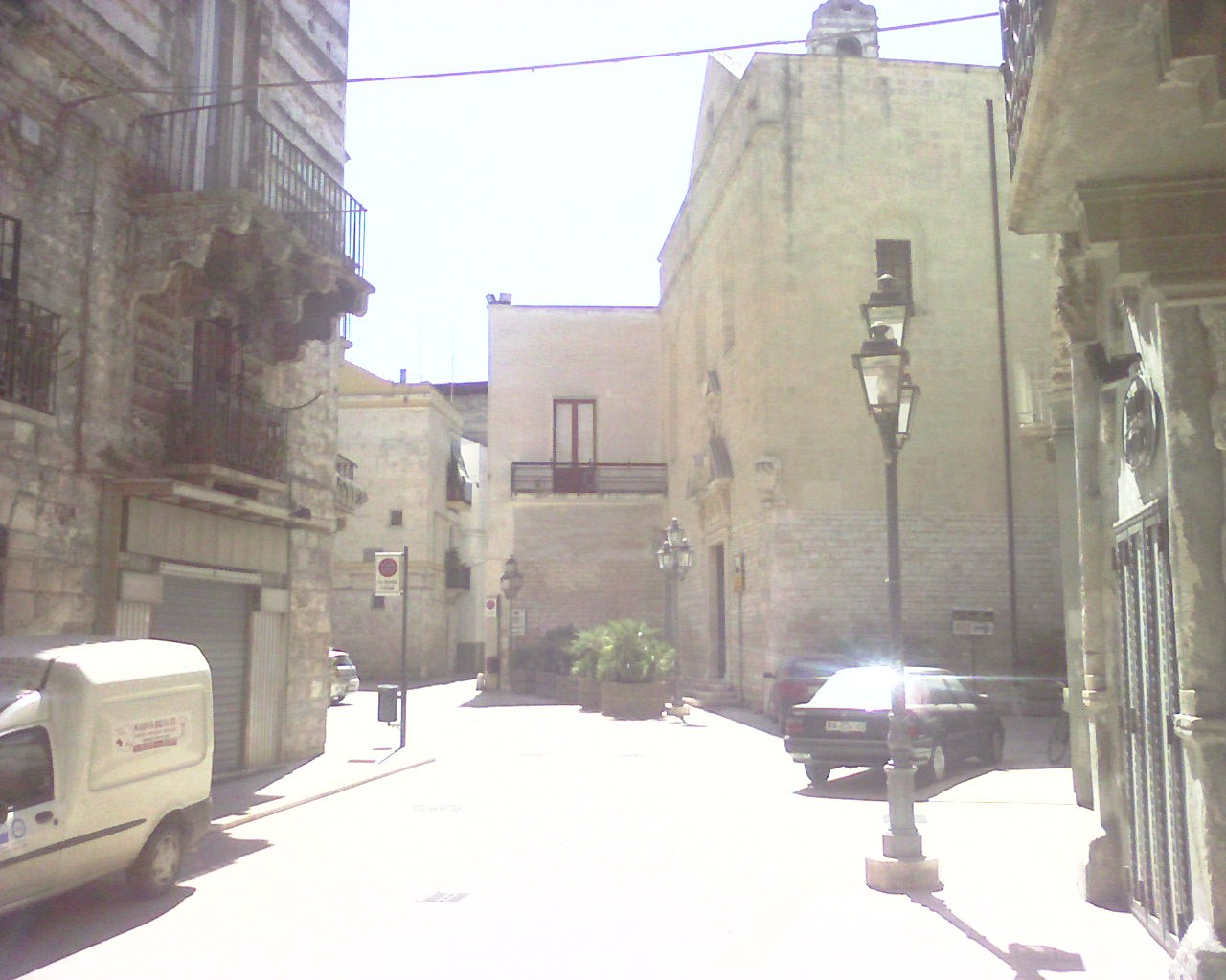 piazza del popolo - Modugno (bari)-Italy